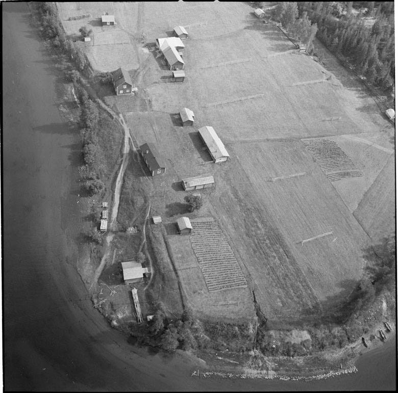 Suoksjokk. Bild mot SO. Motiv: Porsi Nyckelord: Flygbilder Kategori: Insjömiljöer, Bondgård Suoksjokk. Bild mot SO.